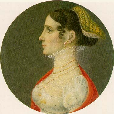 Maria Ludovika Beatrix von Modena (1787-1816), österreichische Kaiserin seit 1808